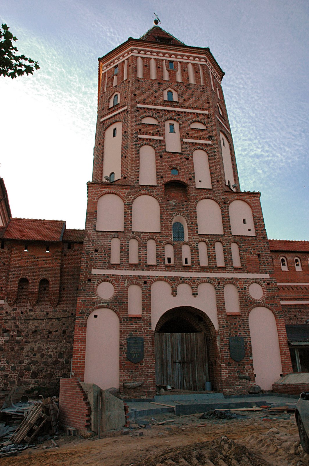 Мирский замок